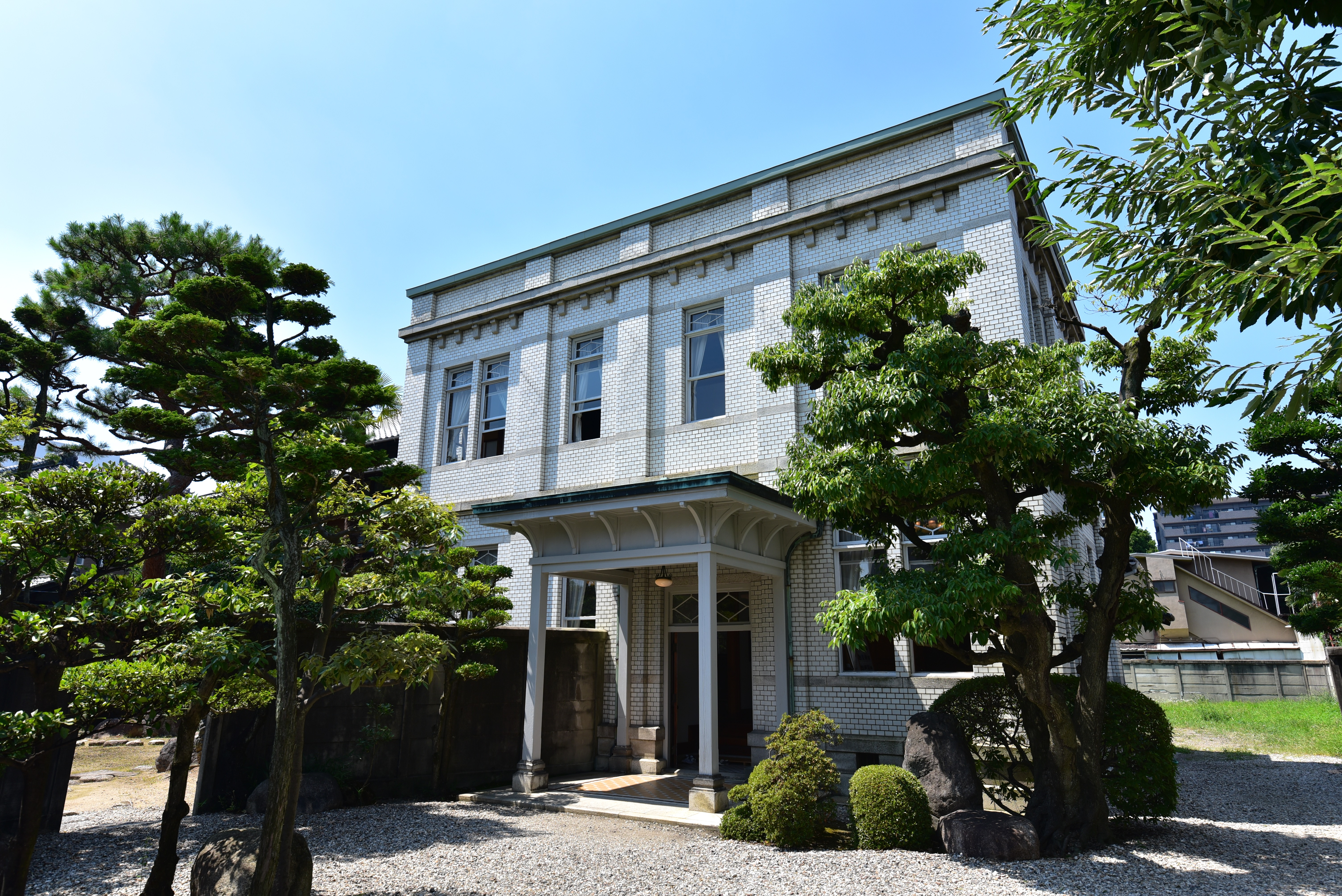 旧豊田佐助邸